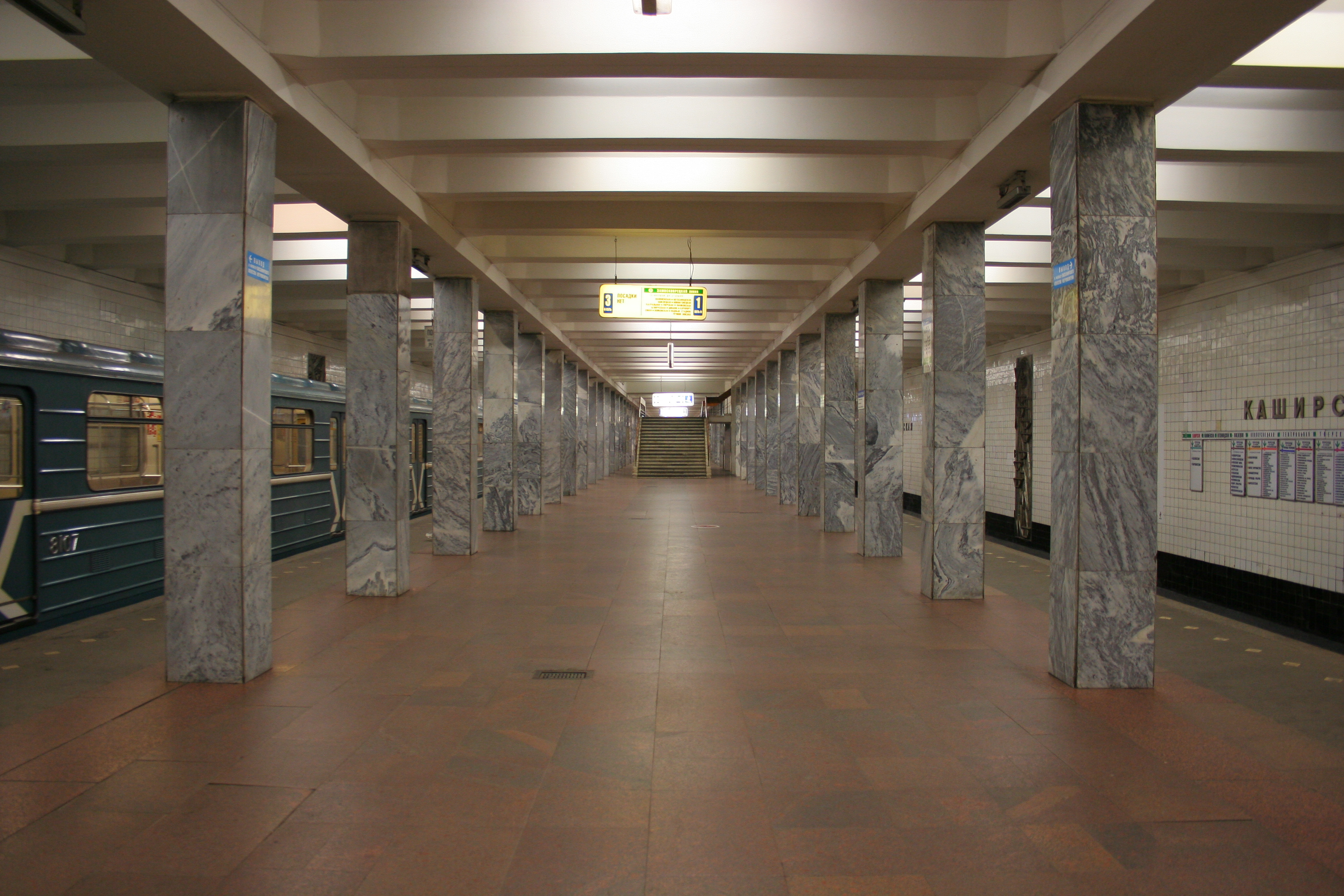 U-Bahnhof Kaschirskaja der Metro Moskau.